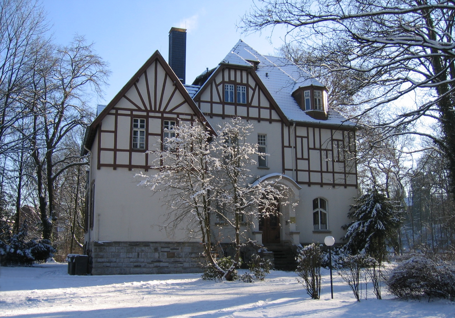 Description: Felsenmeer-Museum, Eingangsseite, denkmalgeschützte Jugendstil-Villa "Grah" in Hemer, Hönnetalstraße 21 Source: selbst fotografiert Date: 29. Jan. 2006 Author: Asio otus